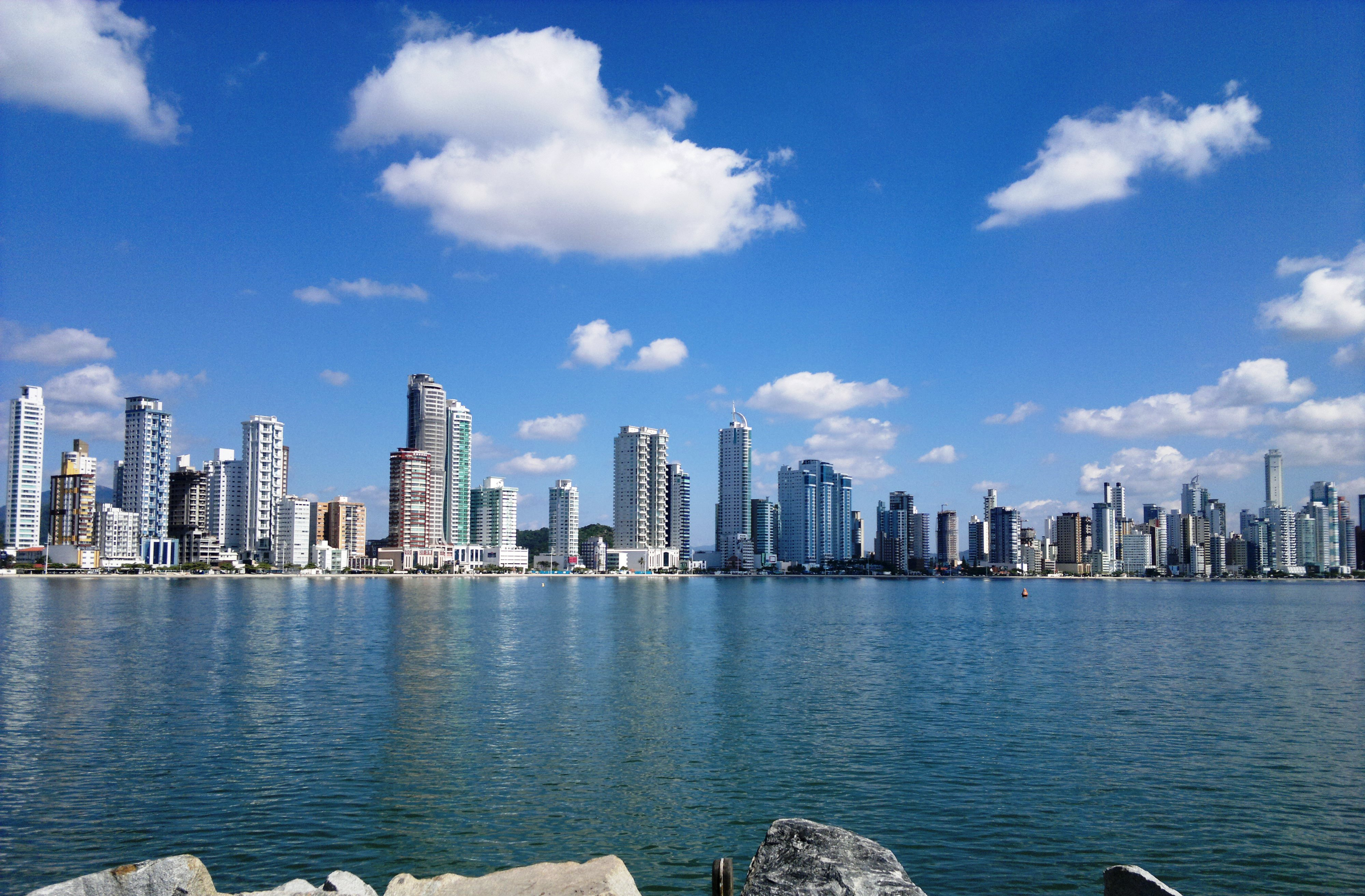 Balneário Camboriú